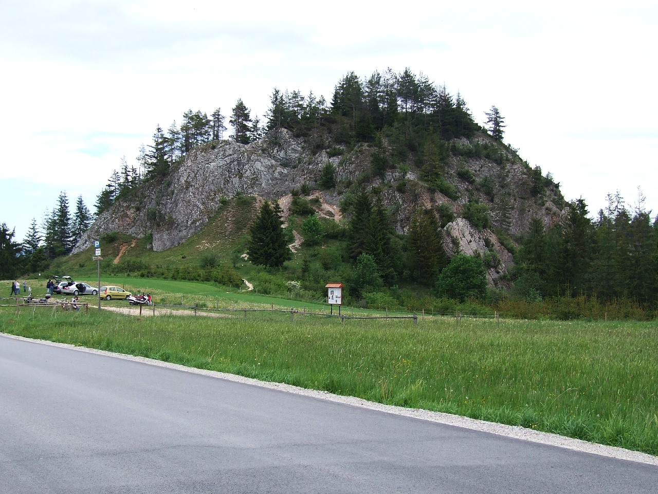 Skała Obłazowa w rezerwacie przyrody Przełom Białki pod Krempachami